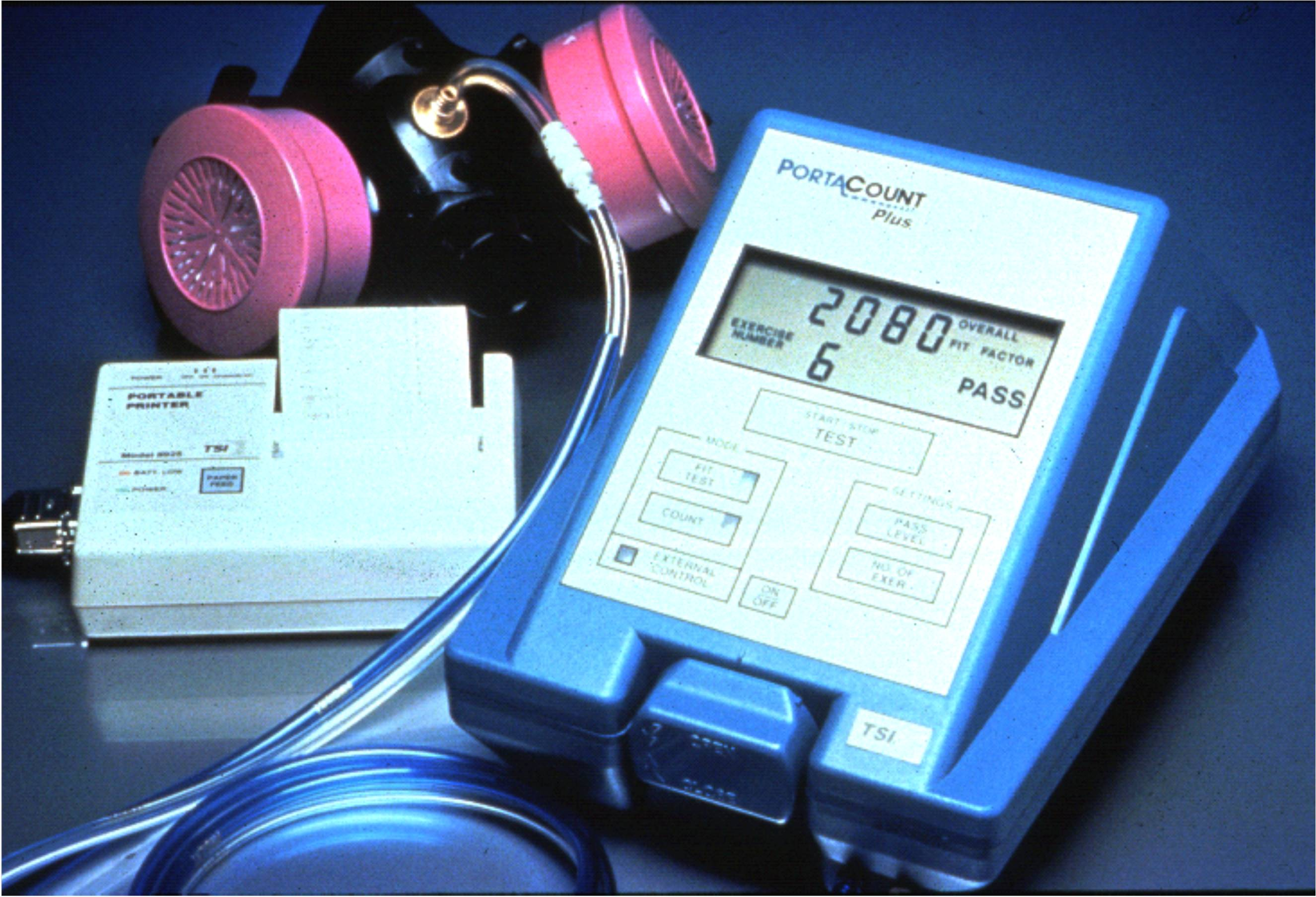 Количественная проверка изолирующих свойств QLFT прибором PortaCount Plus